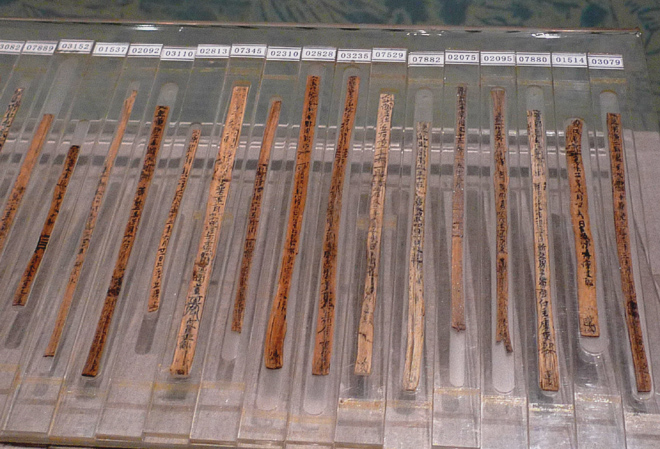 长沙走马楼出土的三国吴简